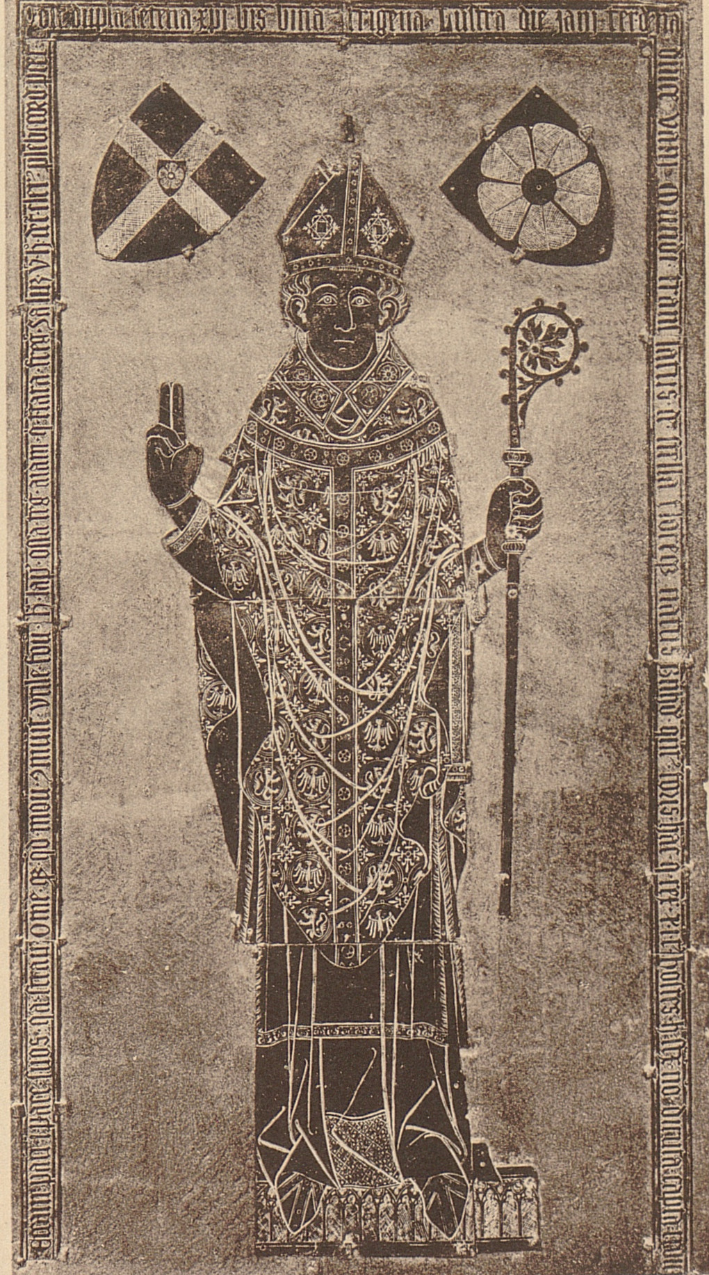 Grabplatte Bernhard V. zur Lippe im Paderborner Dom